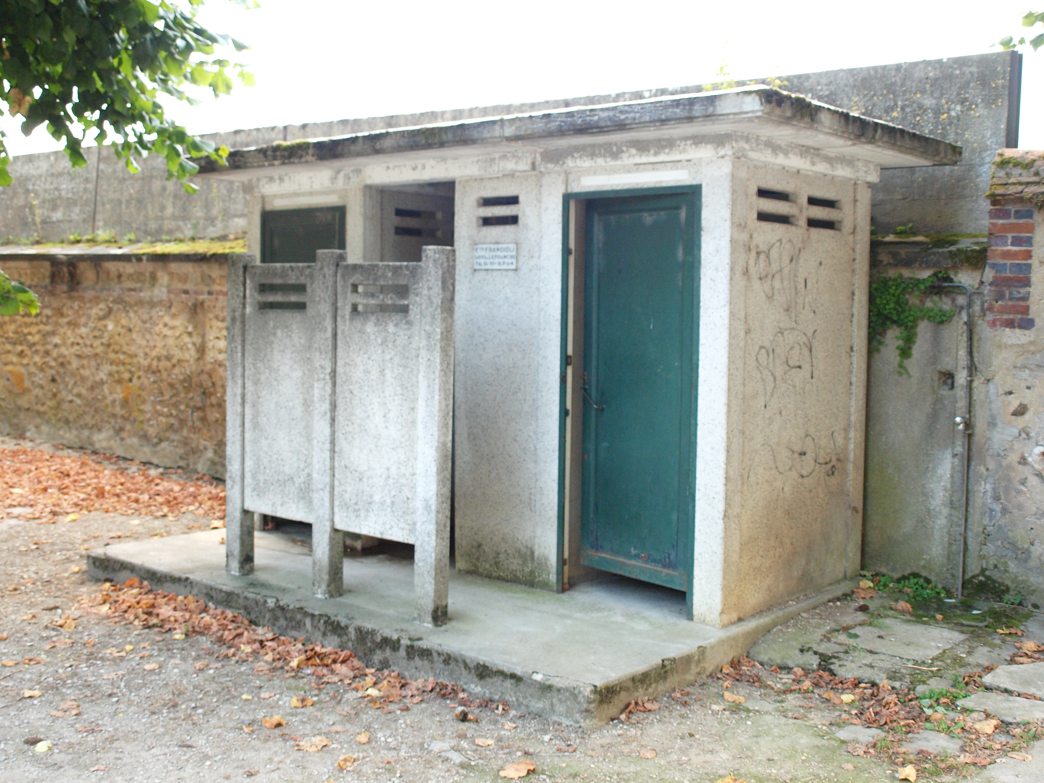 Villeneuve-sur-Yonne (Yonne, France) ; pissotière.